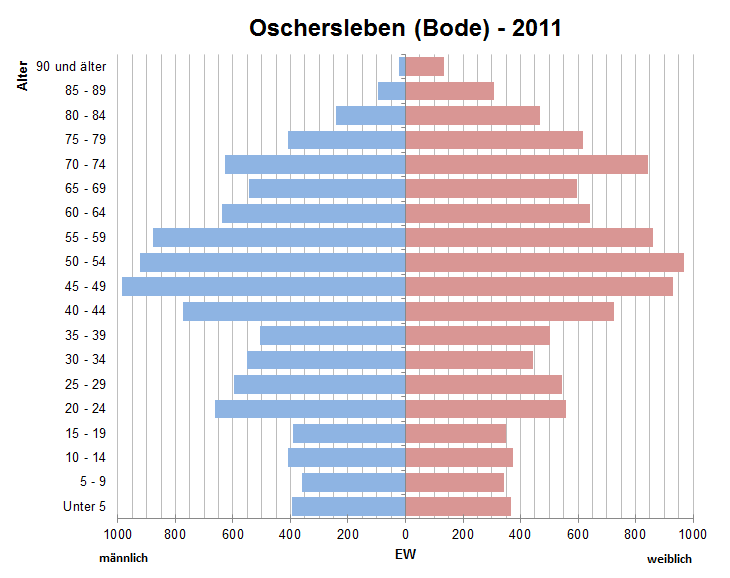 Bevölkerungspyramide der Stadt Oschersleben (Bode) nach Zensus 2011.